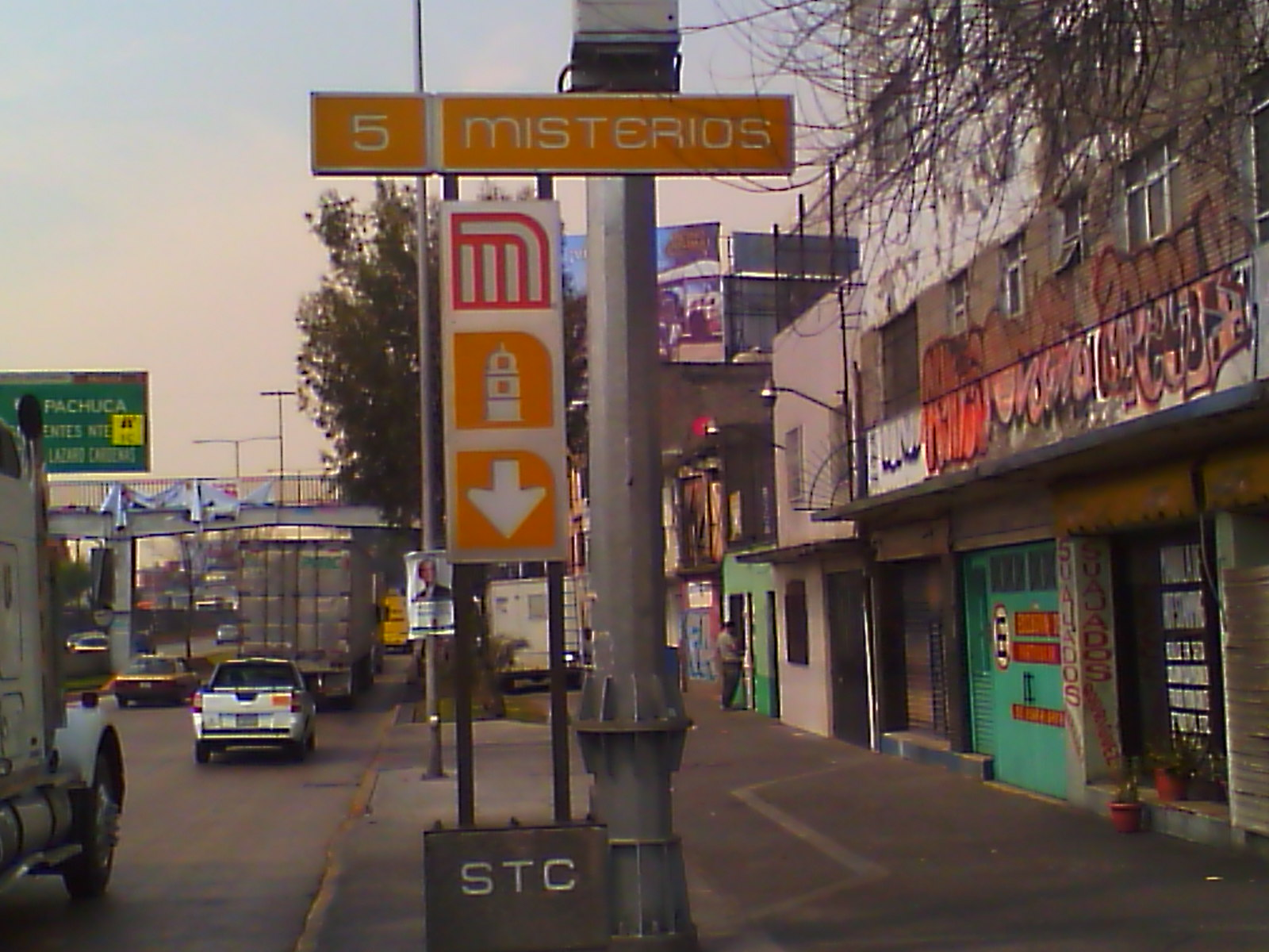 Estela estacion misterios